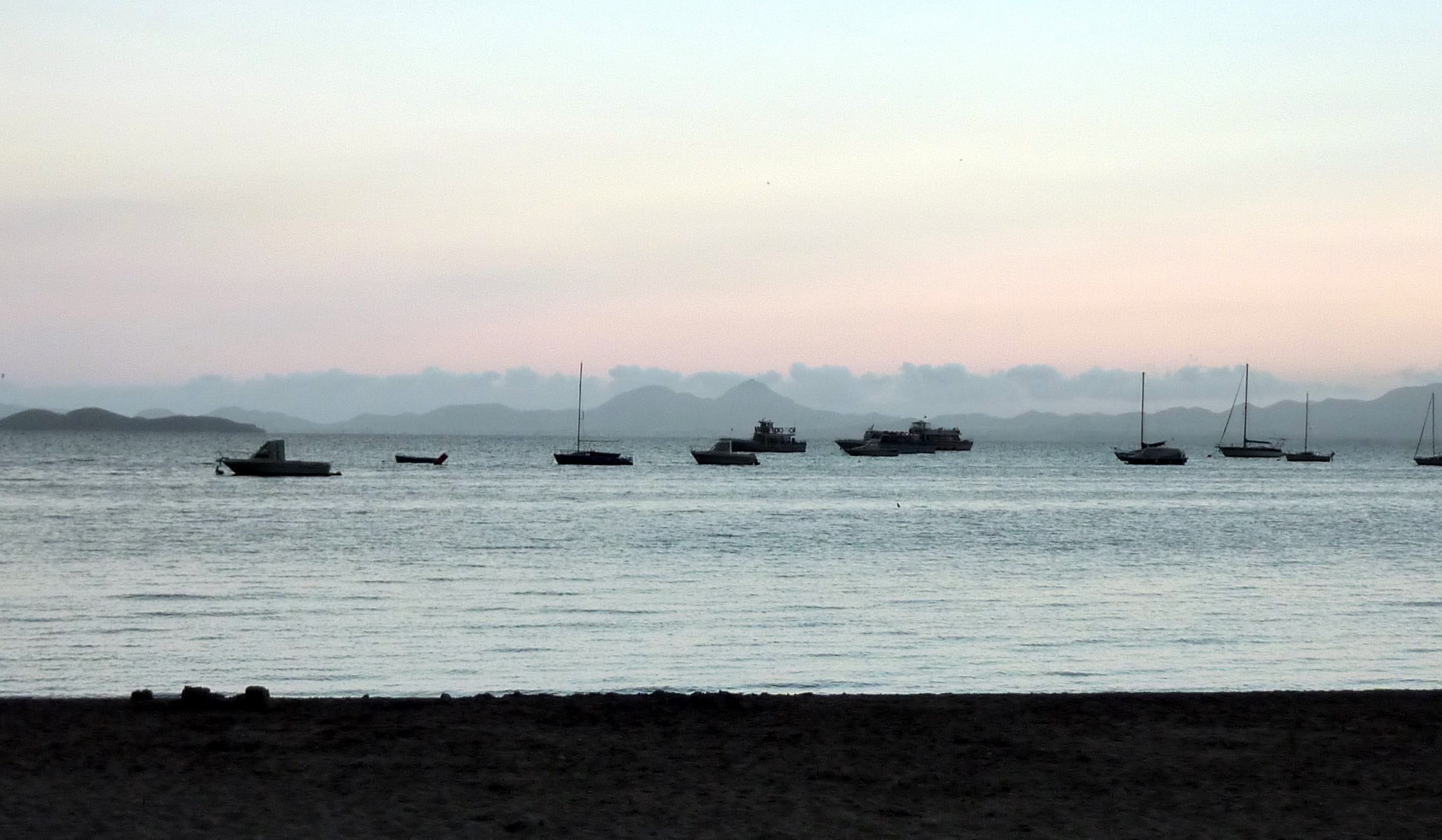 Los Alcazares